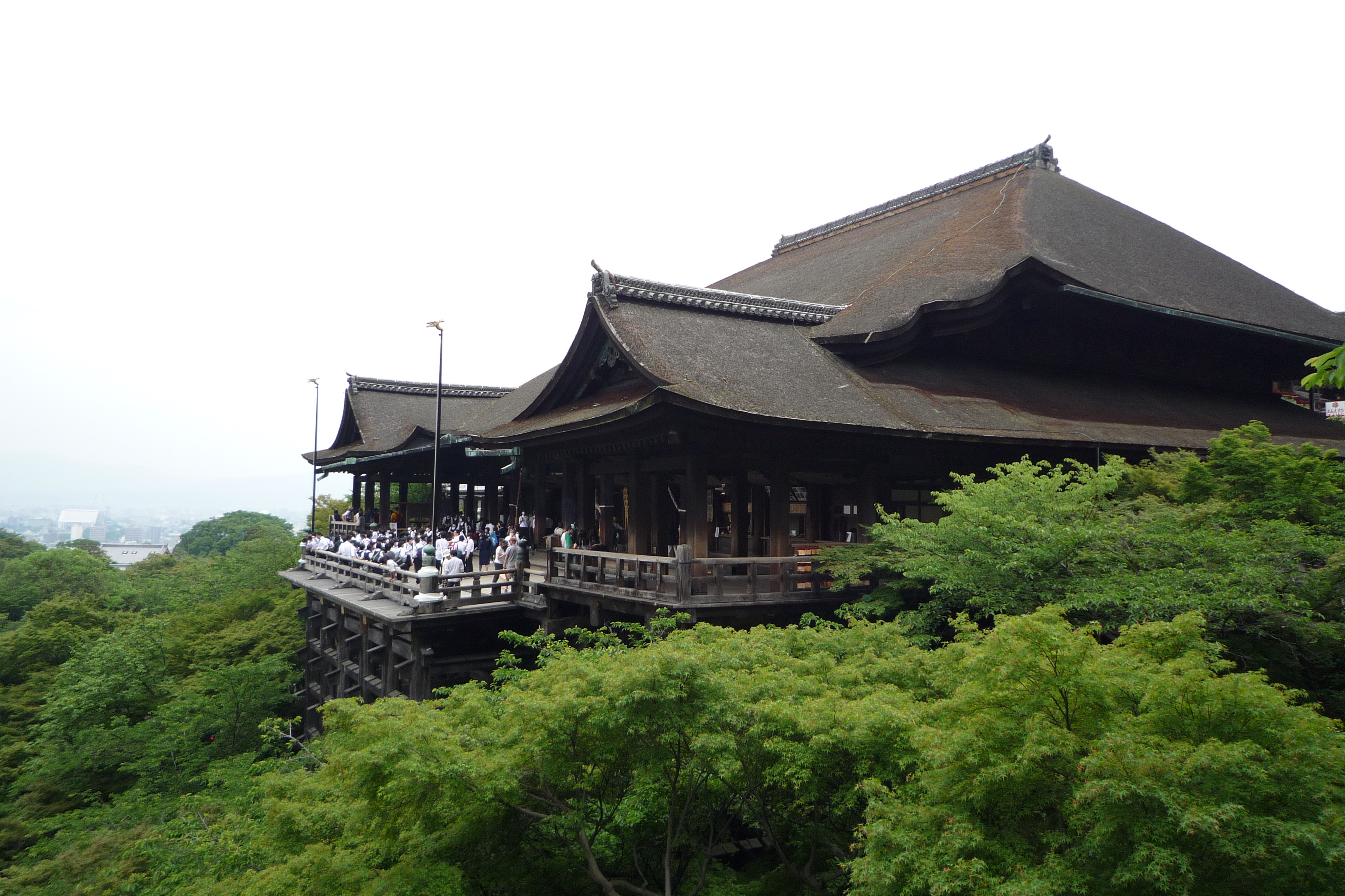 清水寺（Kiyomizu temple）本堂を奥之院から眺める